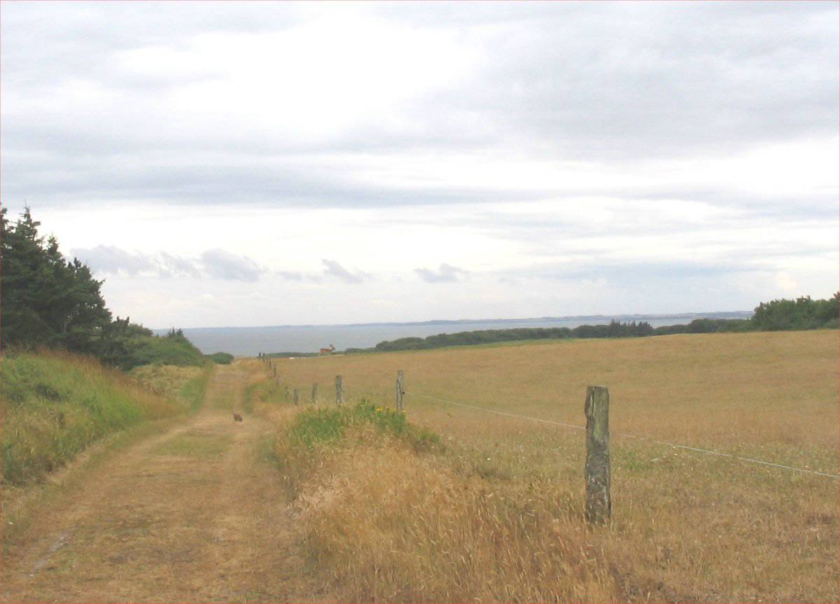 Livø rummer både hjortevildt, dåvildt og en stor bestand af harer. En hare sidder på markvejen, mens en dåhjort ses på bakkekammen.